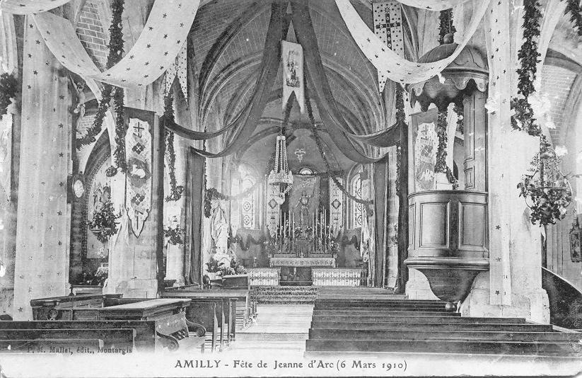 Intérieur de l'église lors de la fête de Jeanne d'Arc, Amilly, Loiret, France